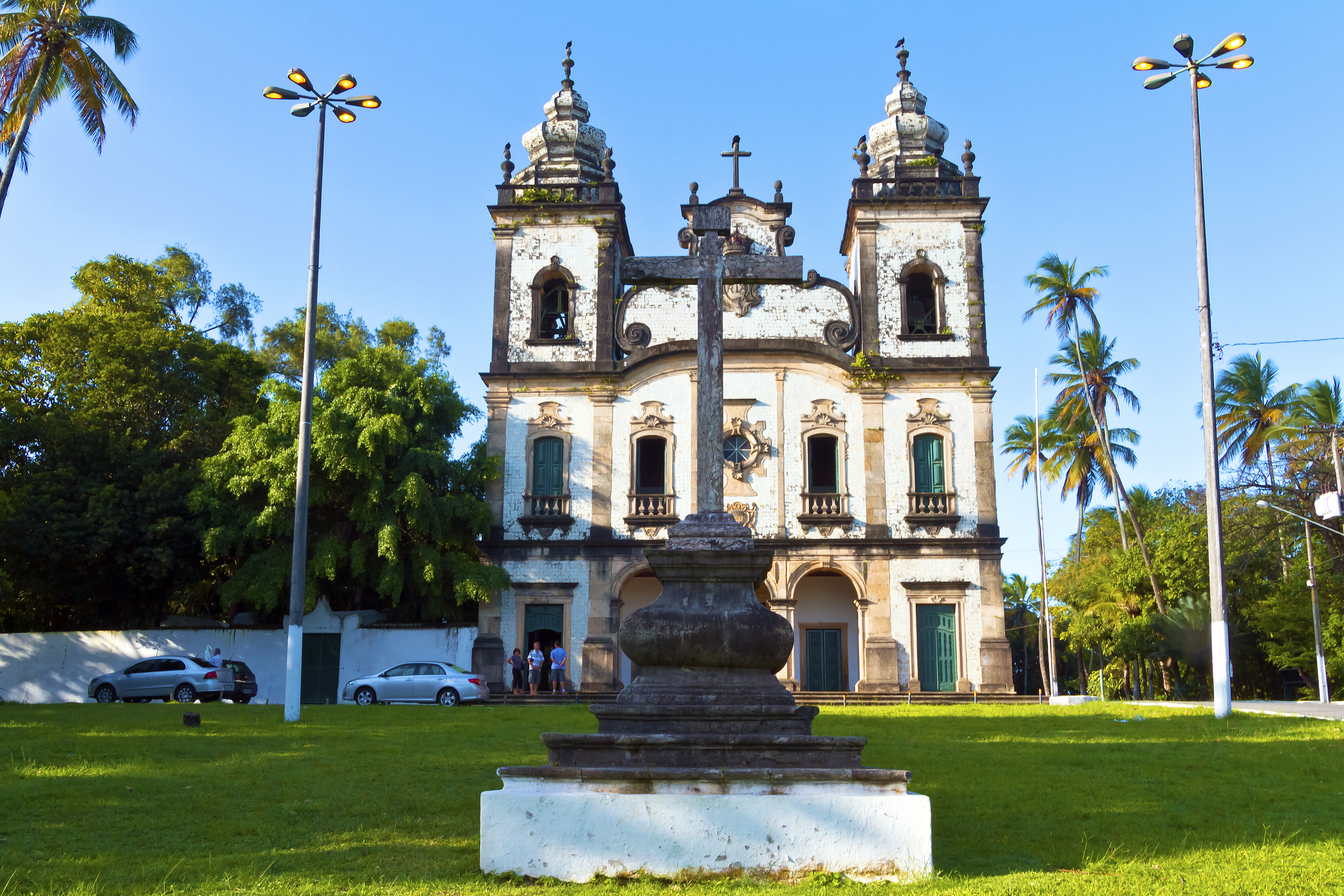 Igreja no Morro dos Guararapes - Jaboatão dos Guararapes - PE